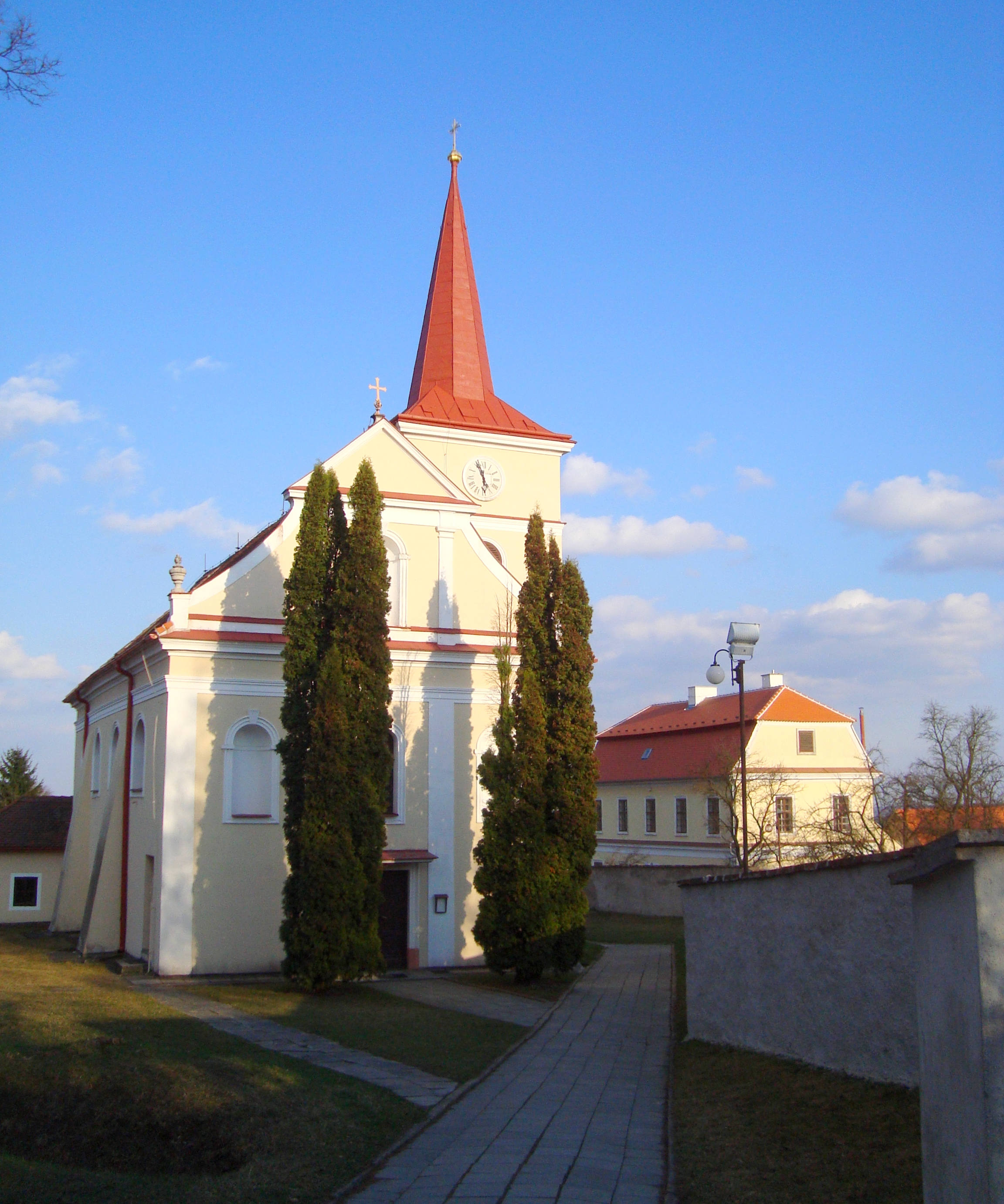 Domašov (Brno-venkov), farní kostel sv. Vavřince, vpravo fara